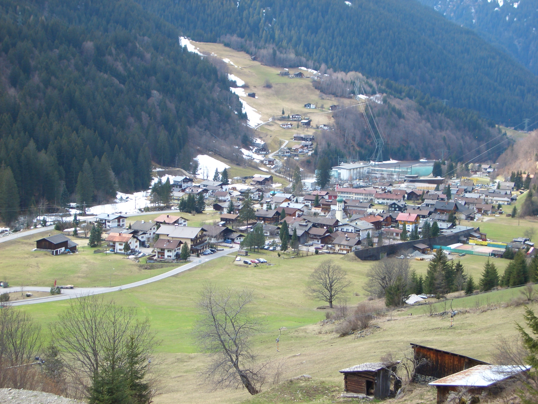 Ansicht von Partenen .